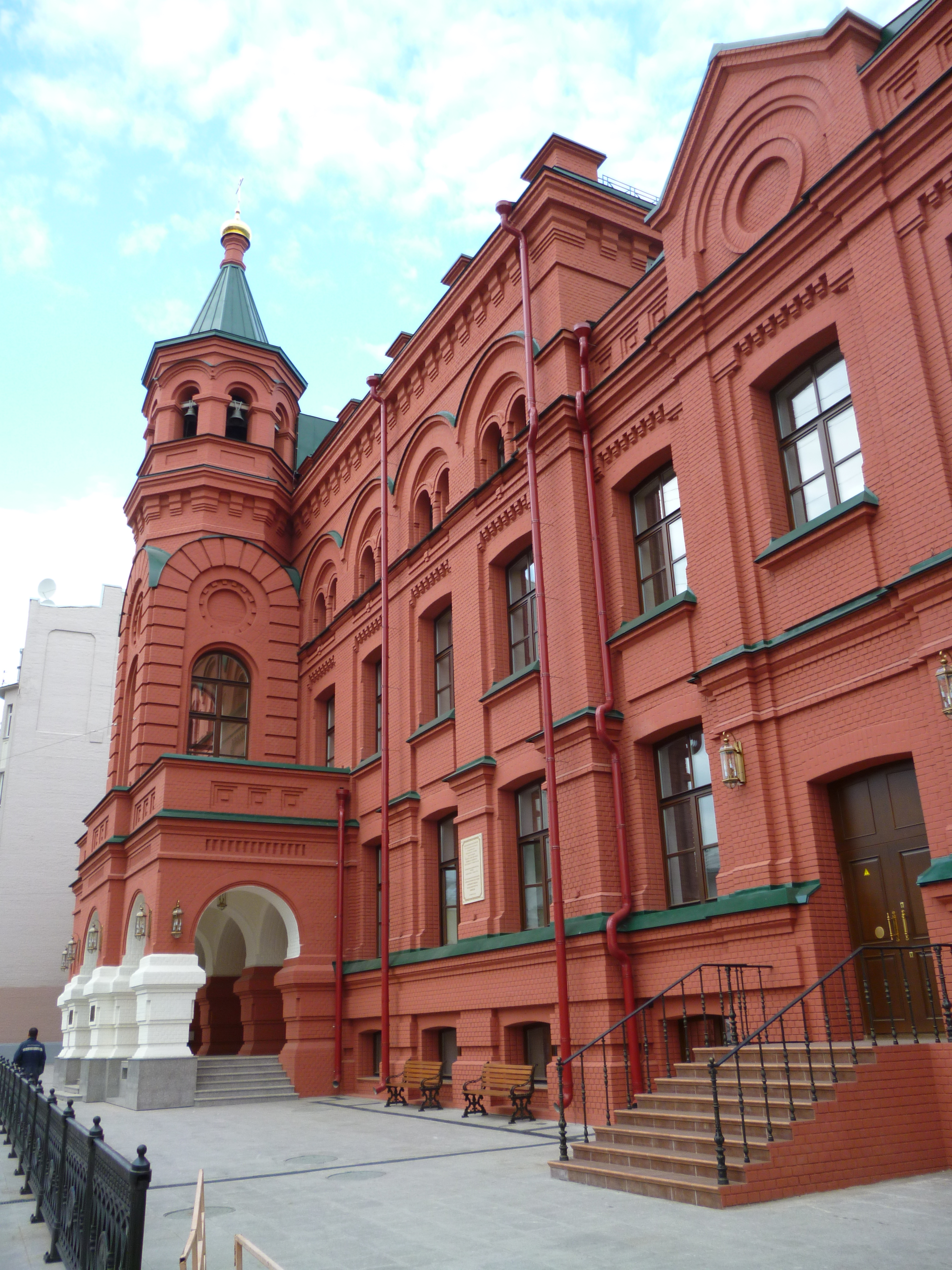 Соборная палата, в которой 28 сентября 1917 года было принято решение о восстановлении Патриаршества в Русской Православной Церкви: Лихов пер., дом 6, строение 1, Тверской, Центральный округ, Москва